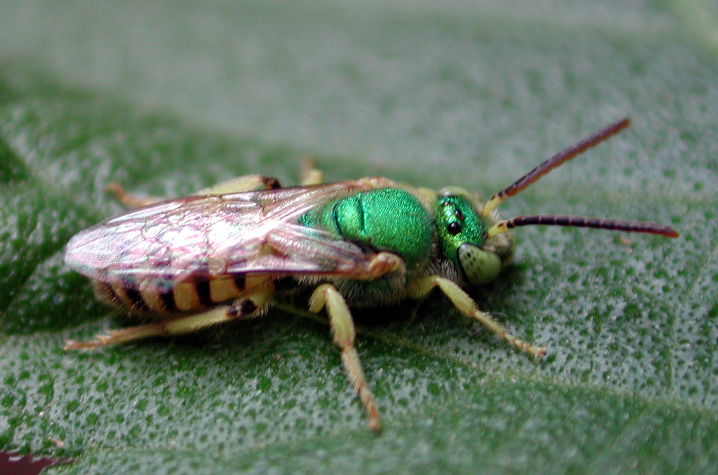 Agapostemon texanus, from Maricopa Co., Arizona, USA.